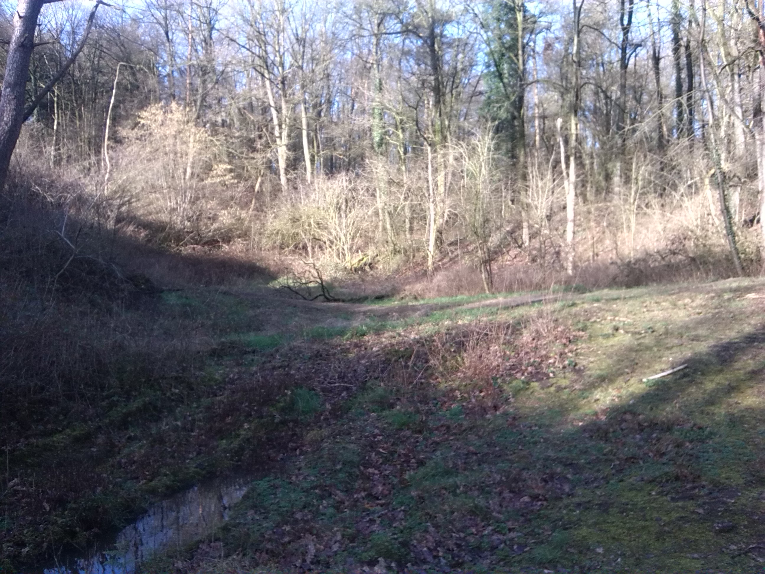 Linksonder is nog een plas water te zien. Door de nog aanwezige leemlaag kan het water niet weg. Het was koud en de plas lag in de schaduw. Er was dus geen kans voor de plas om te verdampen. Genomen op 28 januari 2016.